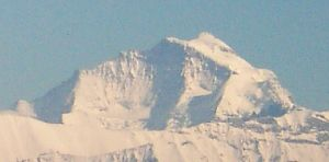 Die Jungfrau von Thun aus gesehen. Fotografiert von Zumbo.